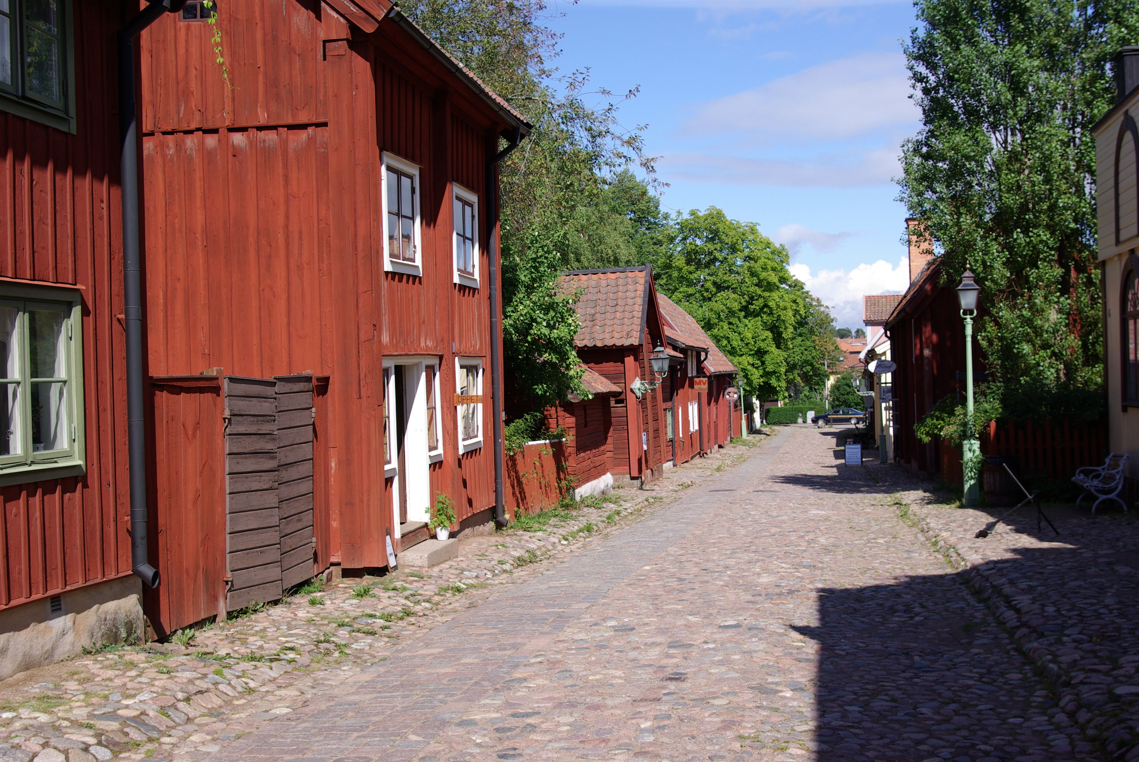 Linköping, Schweden, das Freiluftmuseum Gamla Linköping, eine Straße in dem Freiluftmueseum mit dem typischen roten Häusern